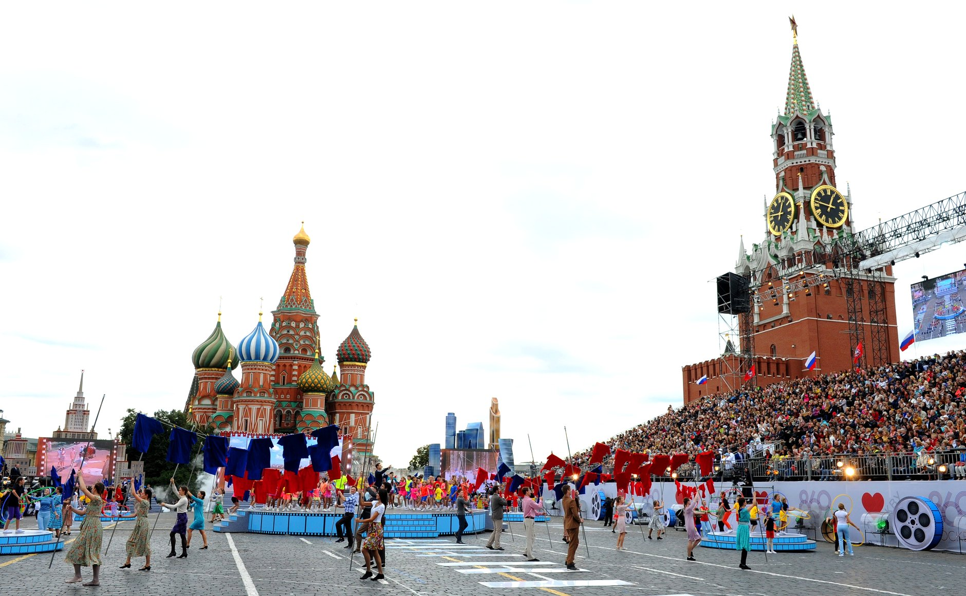 Концерт по случаю Дня города Москвы